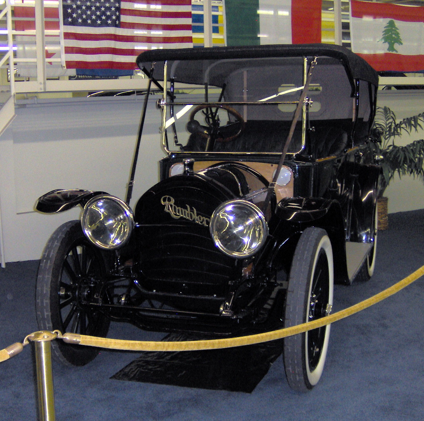 1913 Rambler 5-passenger Touring